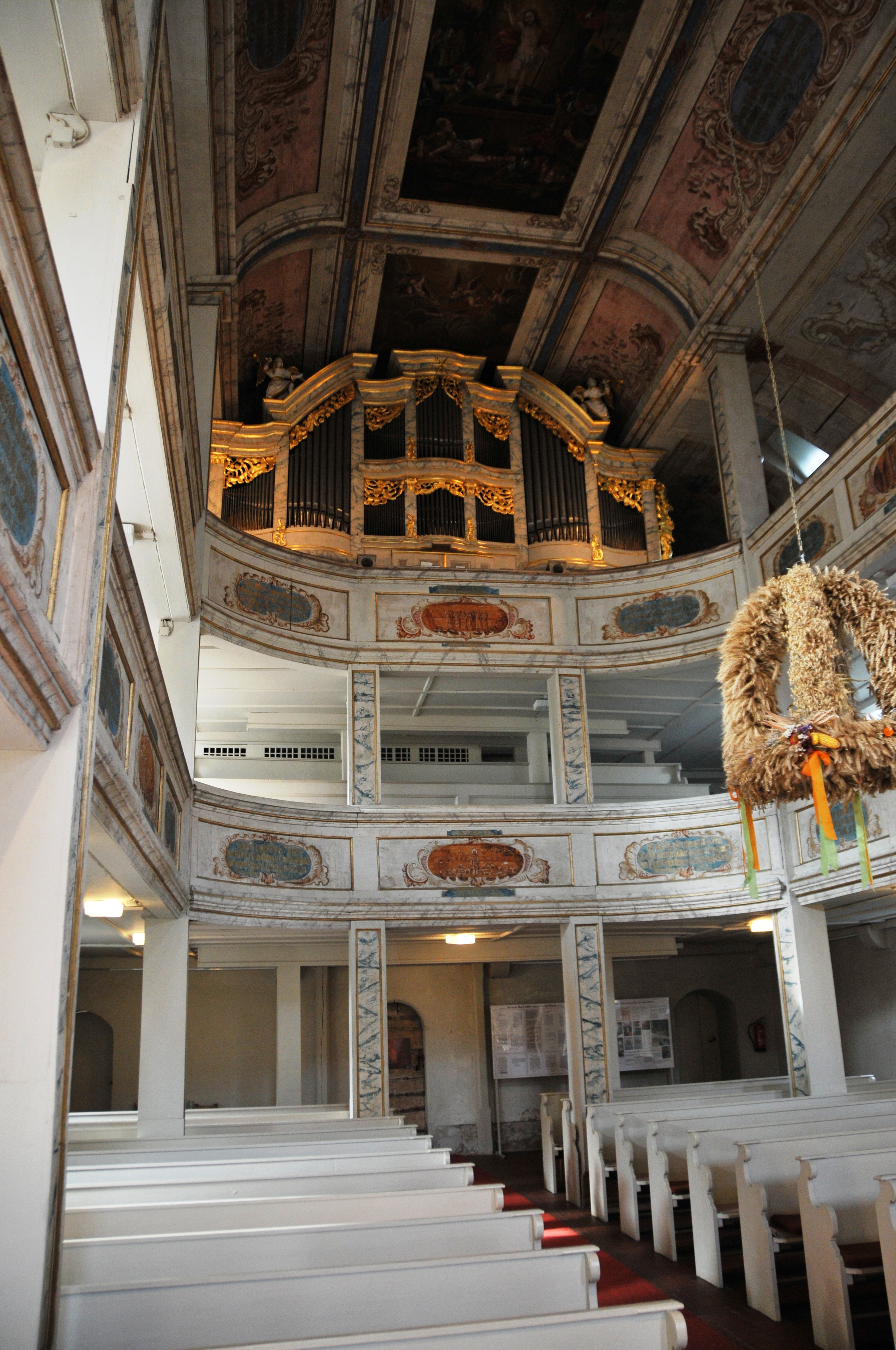 Mechterstädt, Kirche